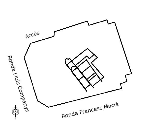 Situació de la vil·la romana de Can Llauder, amb el Impluvium en primer plà. Mataró, el Maresme, (Catalunya).